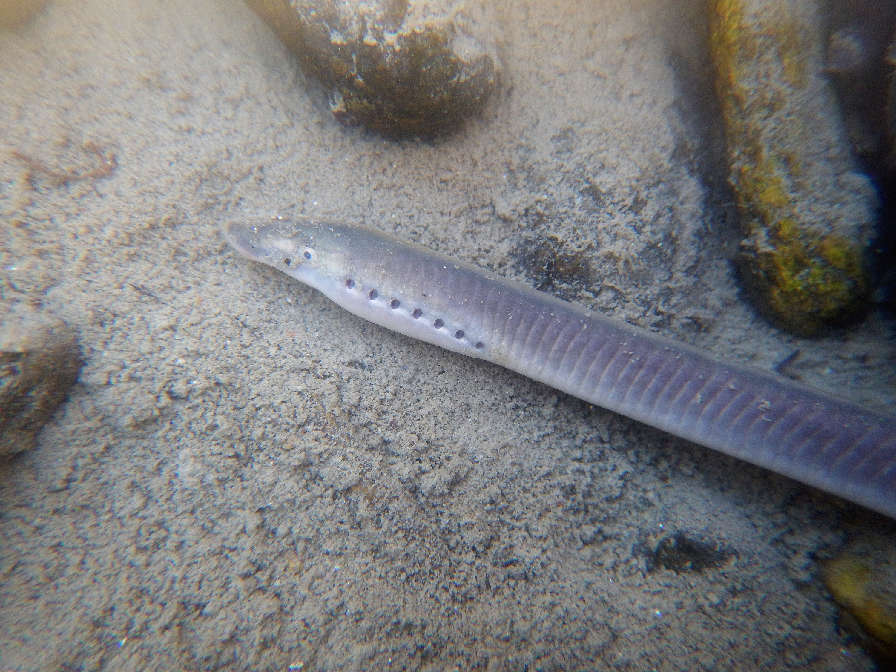 Esemplare adulto su fondale sabbioso-ciottoloso, rinvenuto lungo il basso corso della Dora Baltea